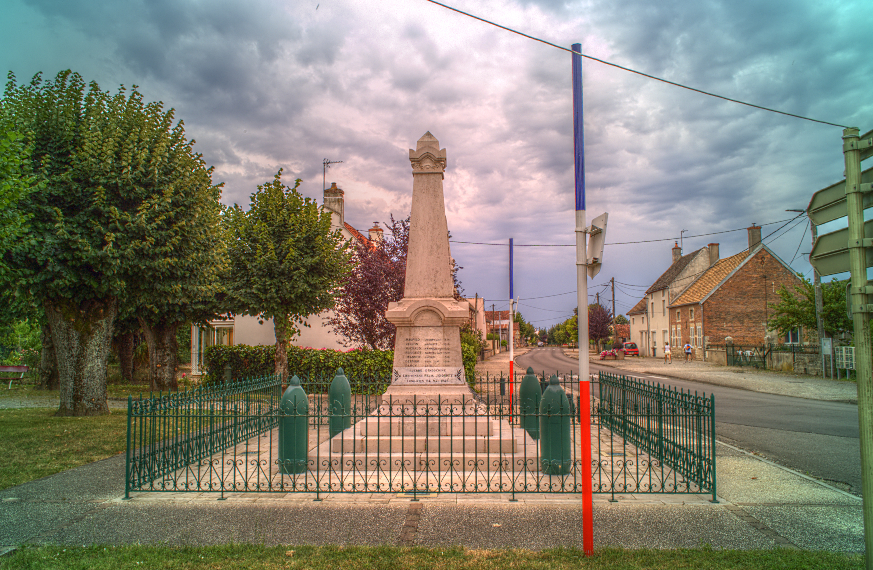 Monument aux morts, Chamblanc (Côte d'Or, Bourgogne, France)